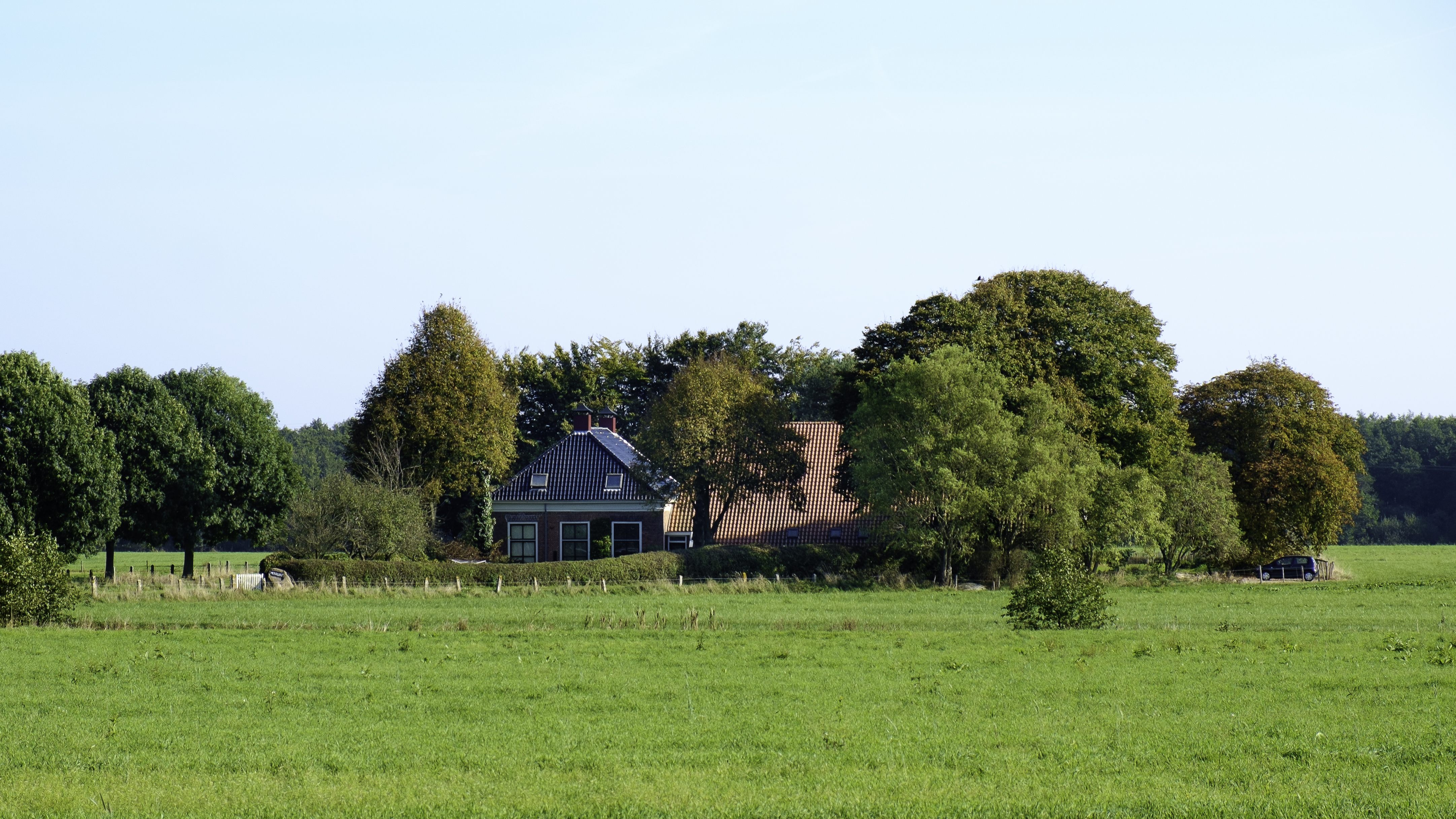 Gezicht op boerderij Meerlust in Noordlaren